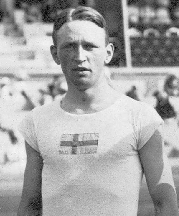 Ture Persson, Stockholm Olympics